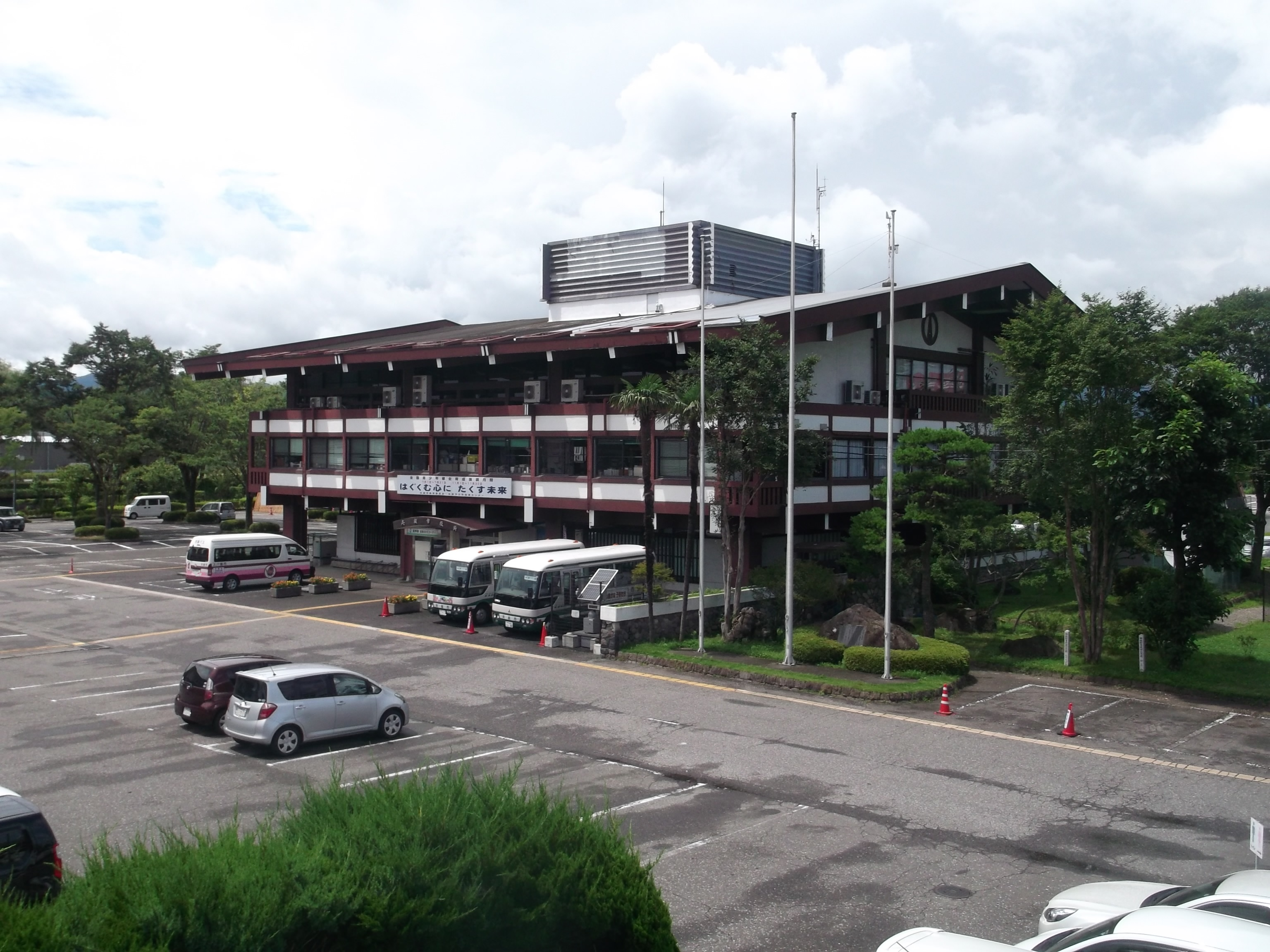 栃木県矢板市役所